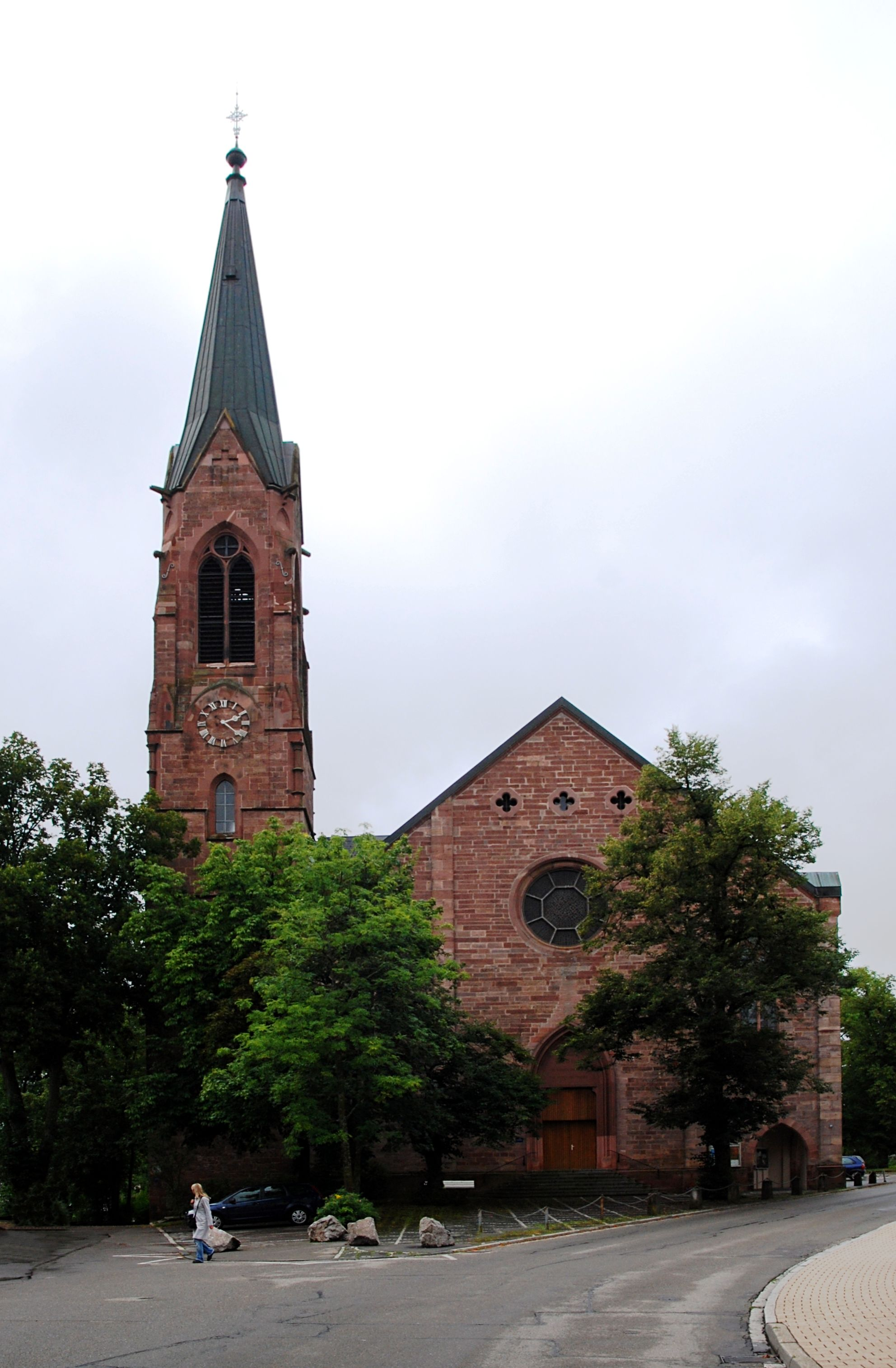 Lorenzkirche St. Georgen im Schwarzwald, 1275 erstmals erwähnt, 19.9.1865 durch Stadtbrand zerstört, Kirchenschiff von 1866/67, Kirchturm 1900 erhöht